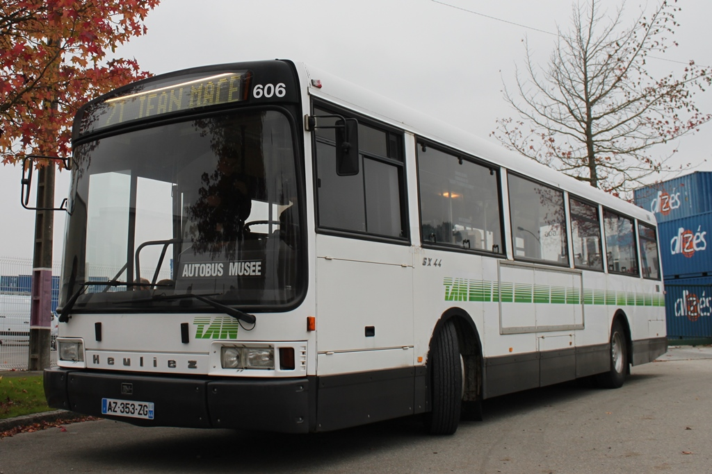 Heuliez GX 44 n°606 : c'est le tout premier bus de l'association, acquis en Août 2010, puis remis en état.